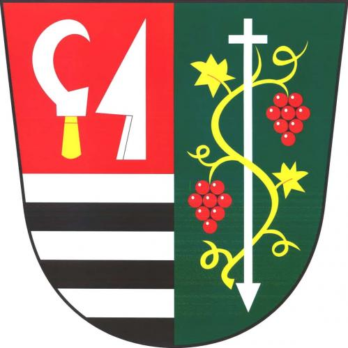 znak, Valtrovice, okres Znojmo